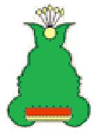 Escudo del Municipio de Yautepec, Morelos.